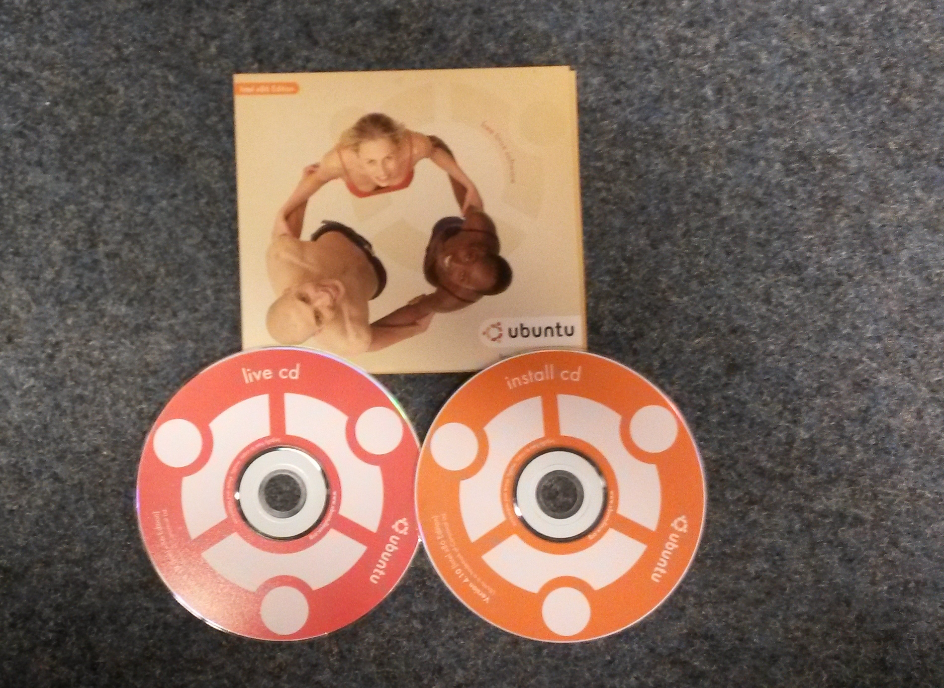 Pochette et CD Ubuntu 4.10